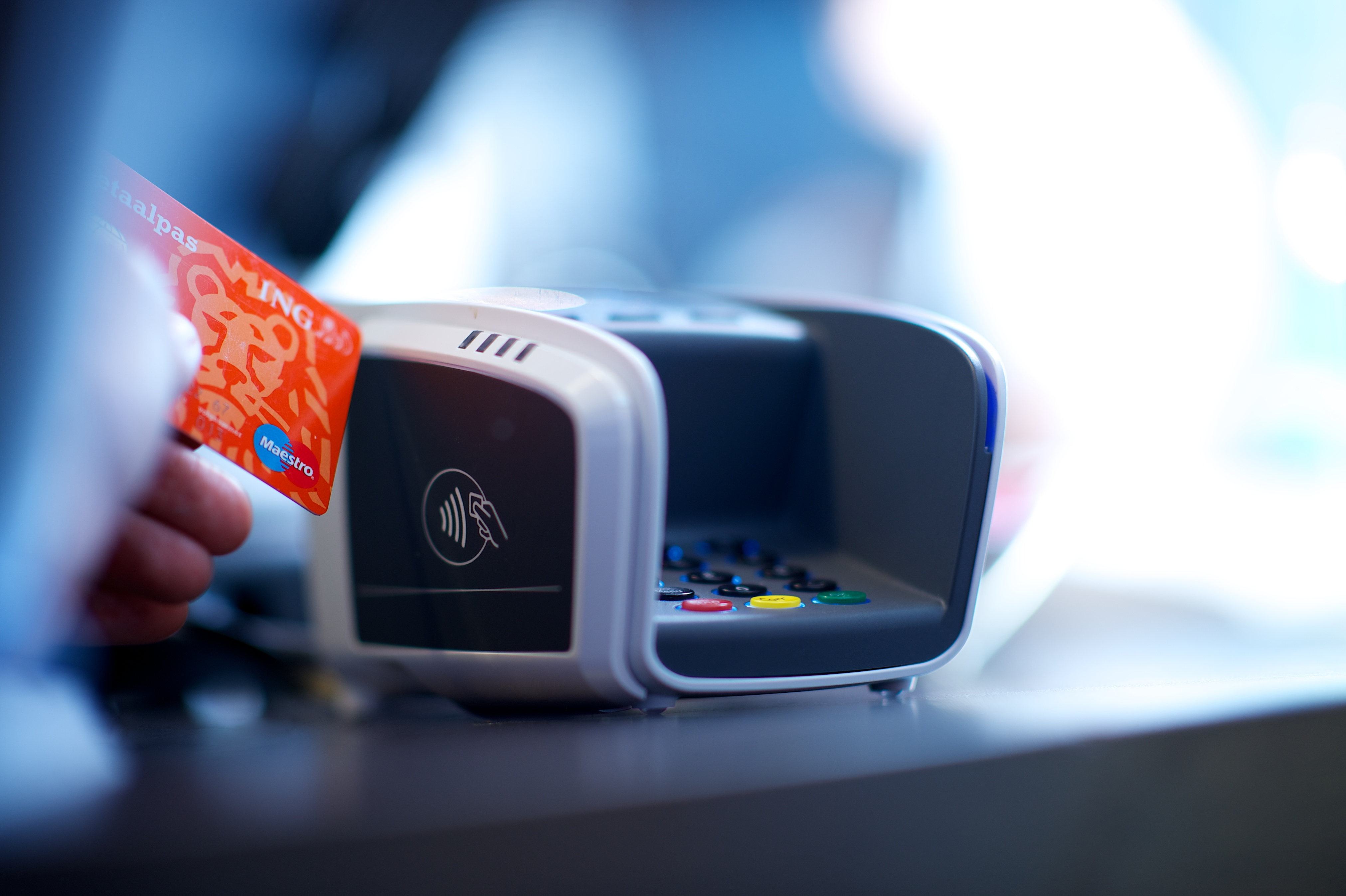 Een pinautomaat met NFC-chiplezer en pinpas.